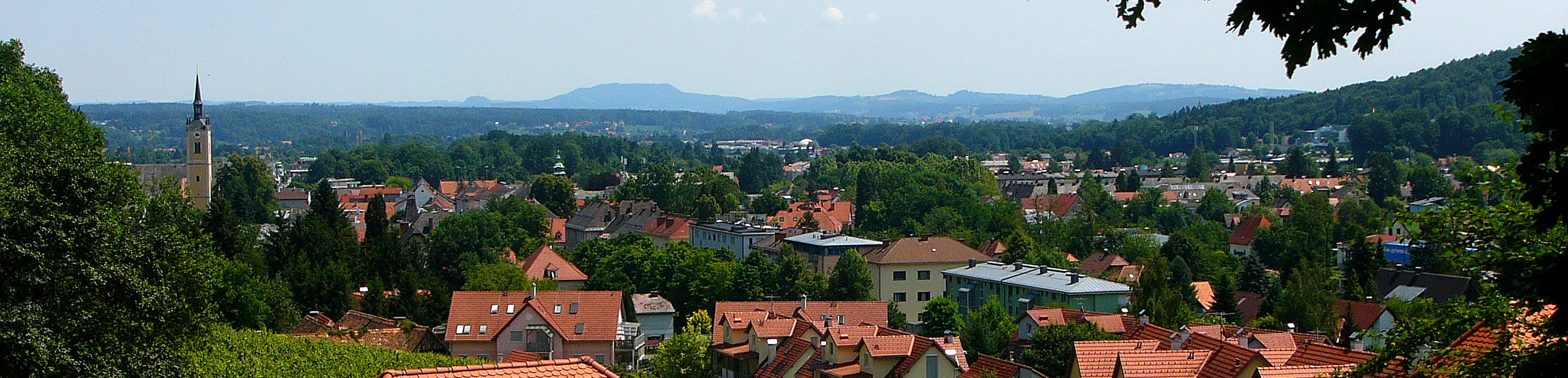 Blick auf Deutschlandsberg